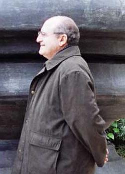 Escultura de Frederic Berthelot que representa a Abel Matutes.